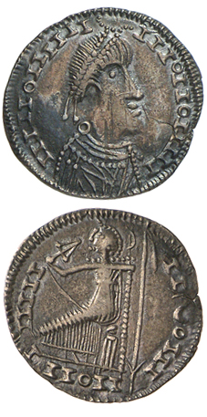 קראַנטקייַט סועוואַ (393-500) פון זילבער. דערווייַל דער נאַציאָנאַלער מוזיי אין בערלין.